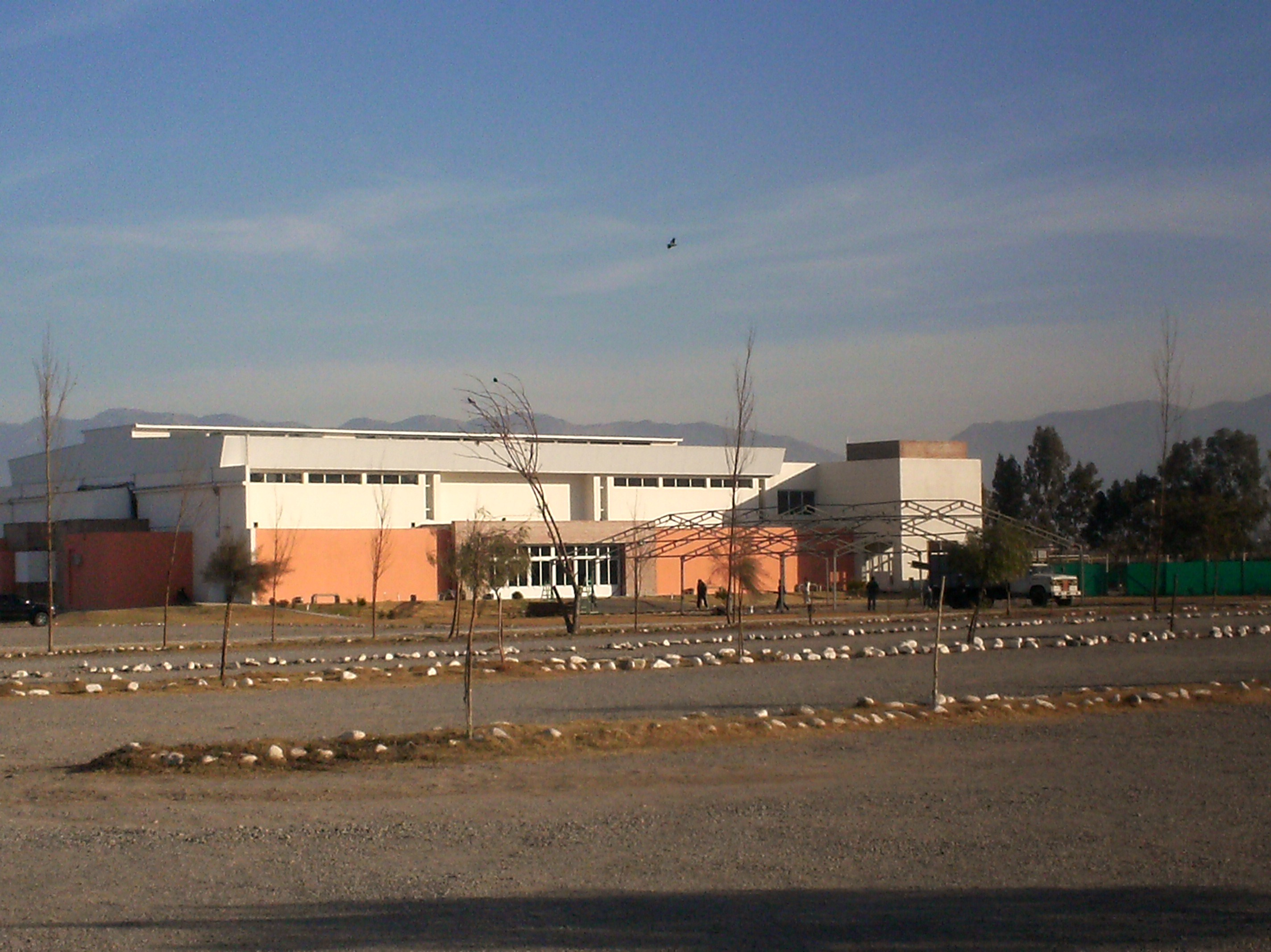 nuevo complejo salon de usos multiples